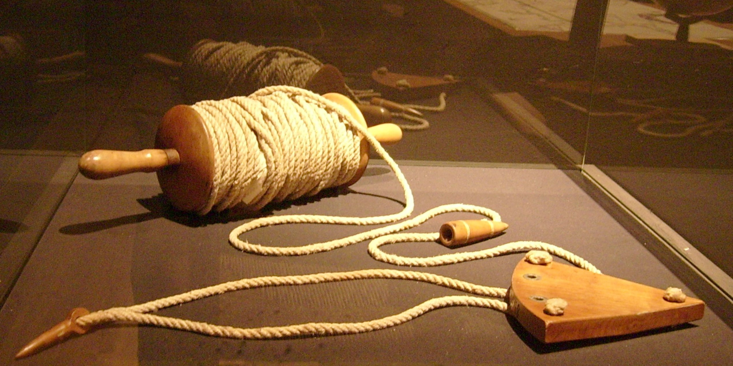 Handlog Geschwindigkeitsmesser